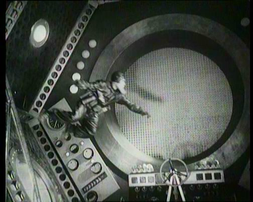 Кадр из фильма «Космический рейс» (СССР, 1935 г.)